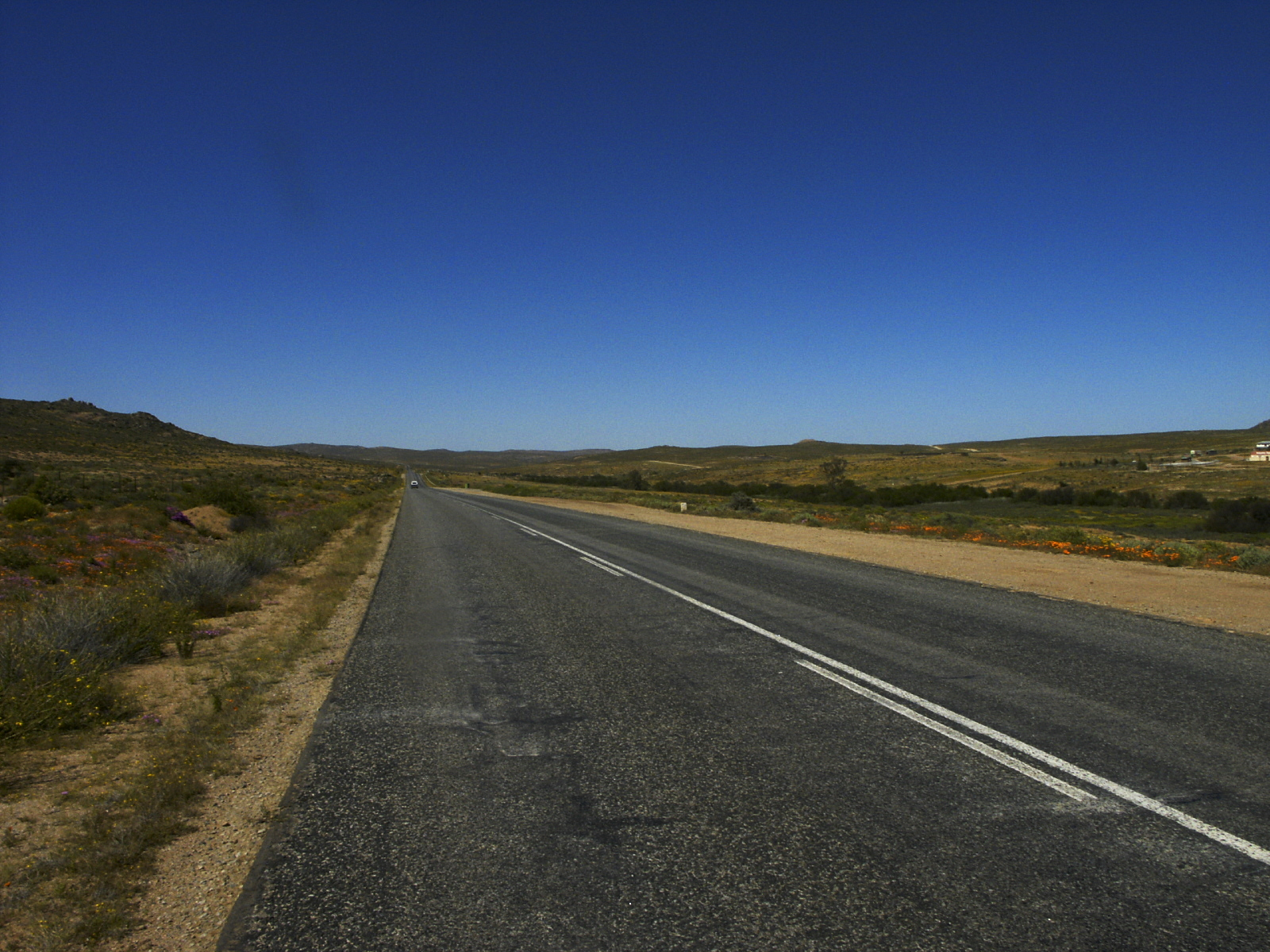 Die N7 in Südafrika hinter Springbock in Richtung Kapstadt